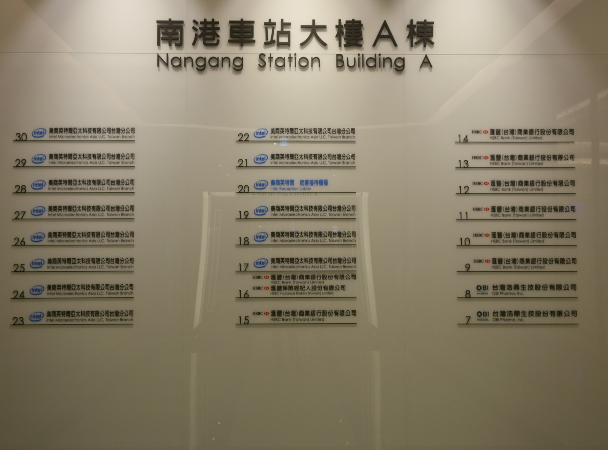 潤泰南港車站大樓A棟7至30樓公司行號牌。